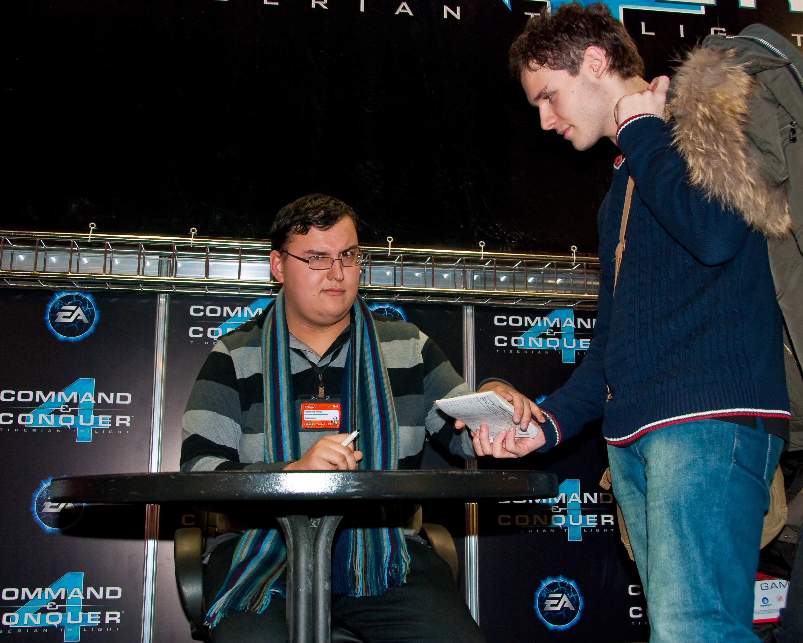 Антон Логвинов на выставке «ИгроМир-2009»